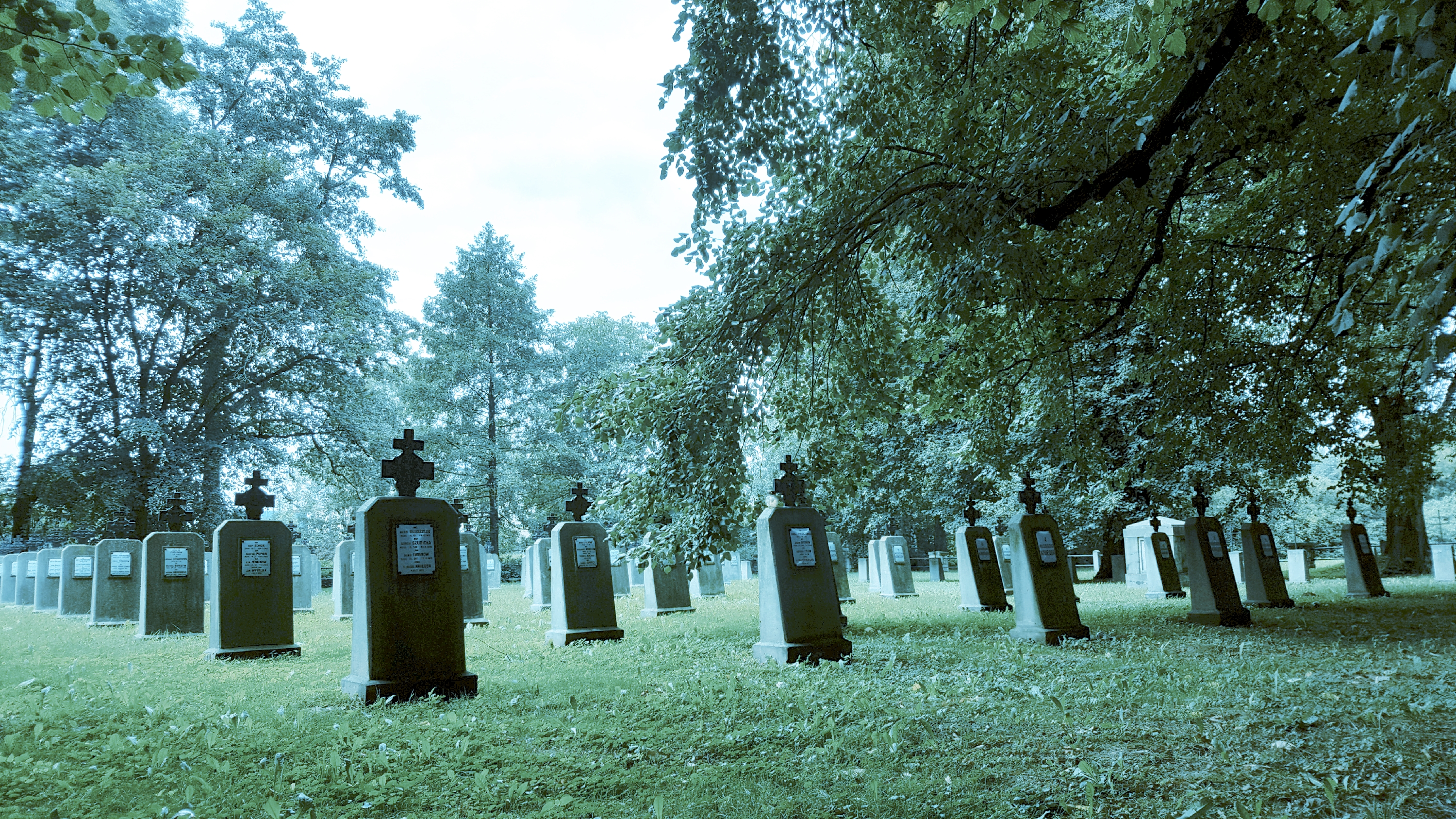 Tarnów, Cmentarz wojenny nr 200 - Tarnów-Chyszów Wikidata has entry Q8513060 with data related to this item.